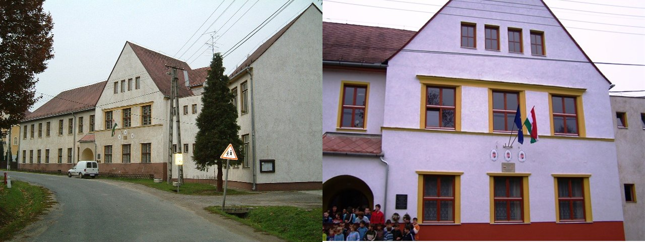 The Felsőszölnökian School montage